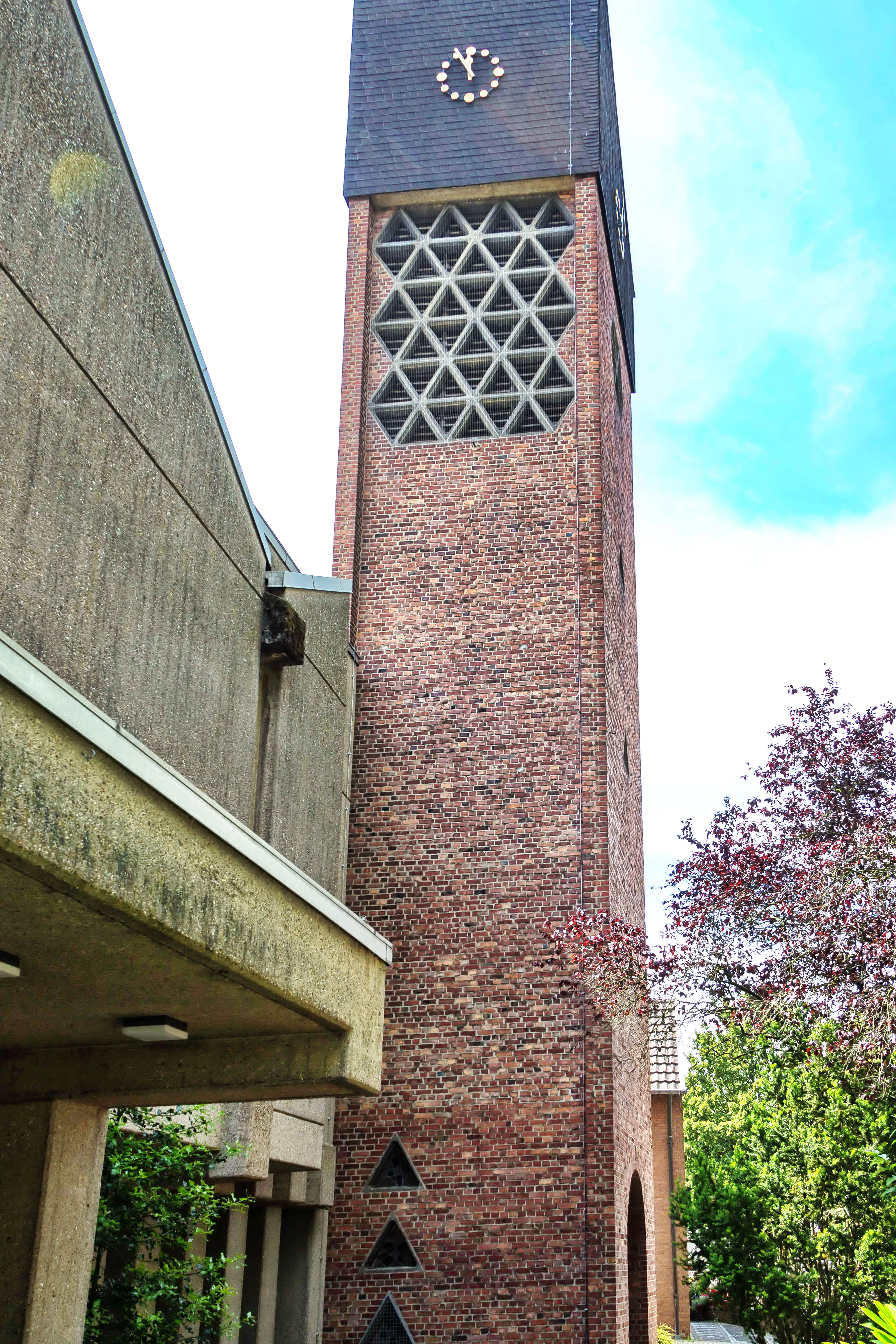 Ehrenmal Lannesdorf; Die Kriegergedächtniskapelle im Turm der Herz-Jesu-Kirche wurde 1958 gestaltet und eingeweiht. Die Planungen für ein Ehrenmal begannen schon 1920 in Lannesdorf, sie wurden jedoch erst 1956 wieder aufgenommen. 1958 beschlossen die Ortsvereine die Errichtung im Glockenturm der Herz-Jesu-Kirche. Die Rückwand der offenen Kapelle wurde mit einer Keramik gestaltet, die den auferstandenen Christus mit einem Engel und eingerahmt von den Symbolen der vier Evangelisten, einem Löwen, einem Adler, einem Stier und einem Menschen, zeigt. An den Steinwänden links und rechts sind die Namen der Gefallenen beider Weltkriege aufgeführt.